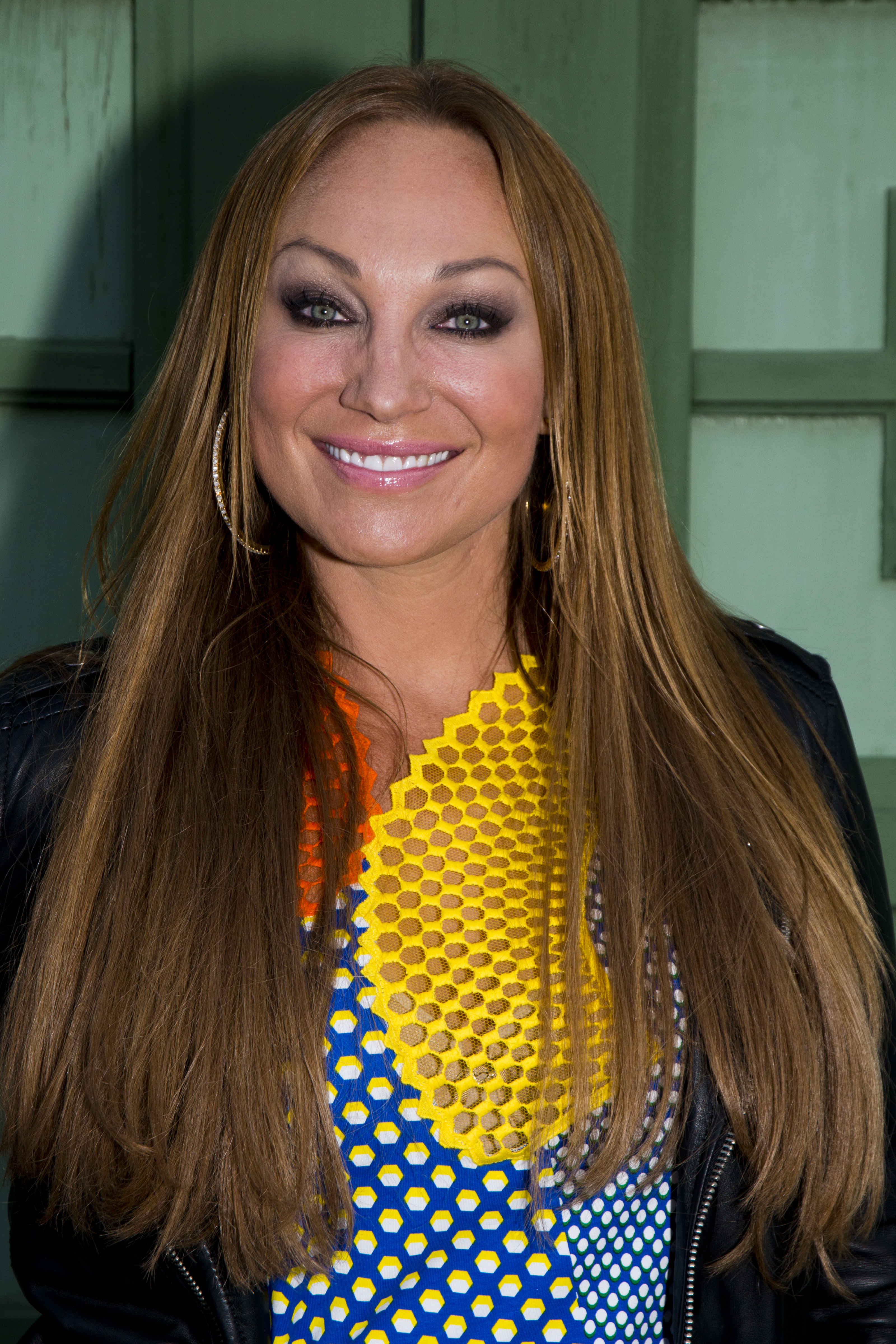 Charlotte Perrelli på Sommarkrysset, Gröna Lund i Stockholm